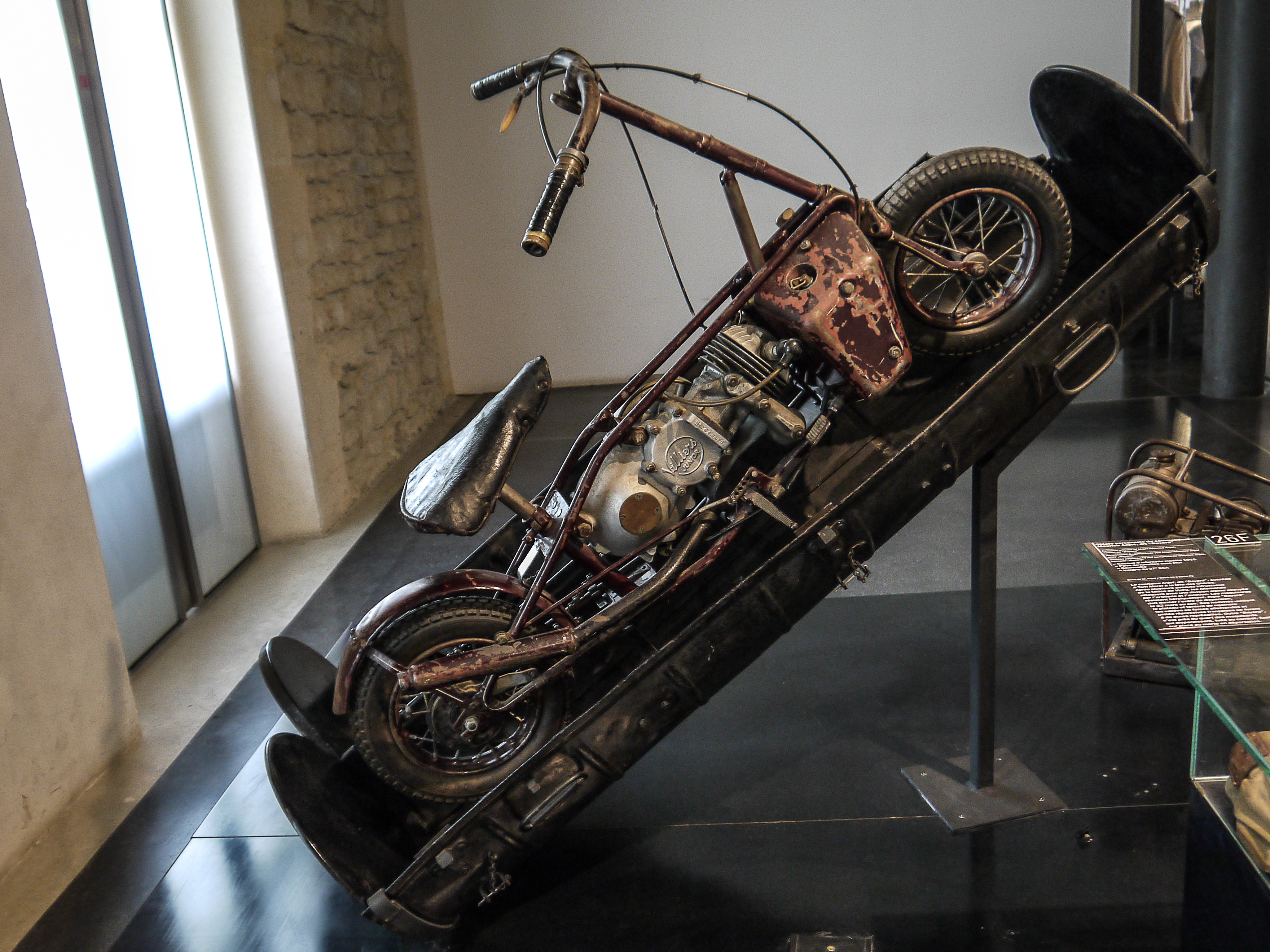 Motocyclette pliante Welbike dans son container de parachutage (Cet exemplaire de la très rare motocyclette britanique Welbike fut parachuté à André Jarrot de la Mission Armada (réseaux action de la France Combattante))